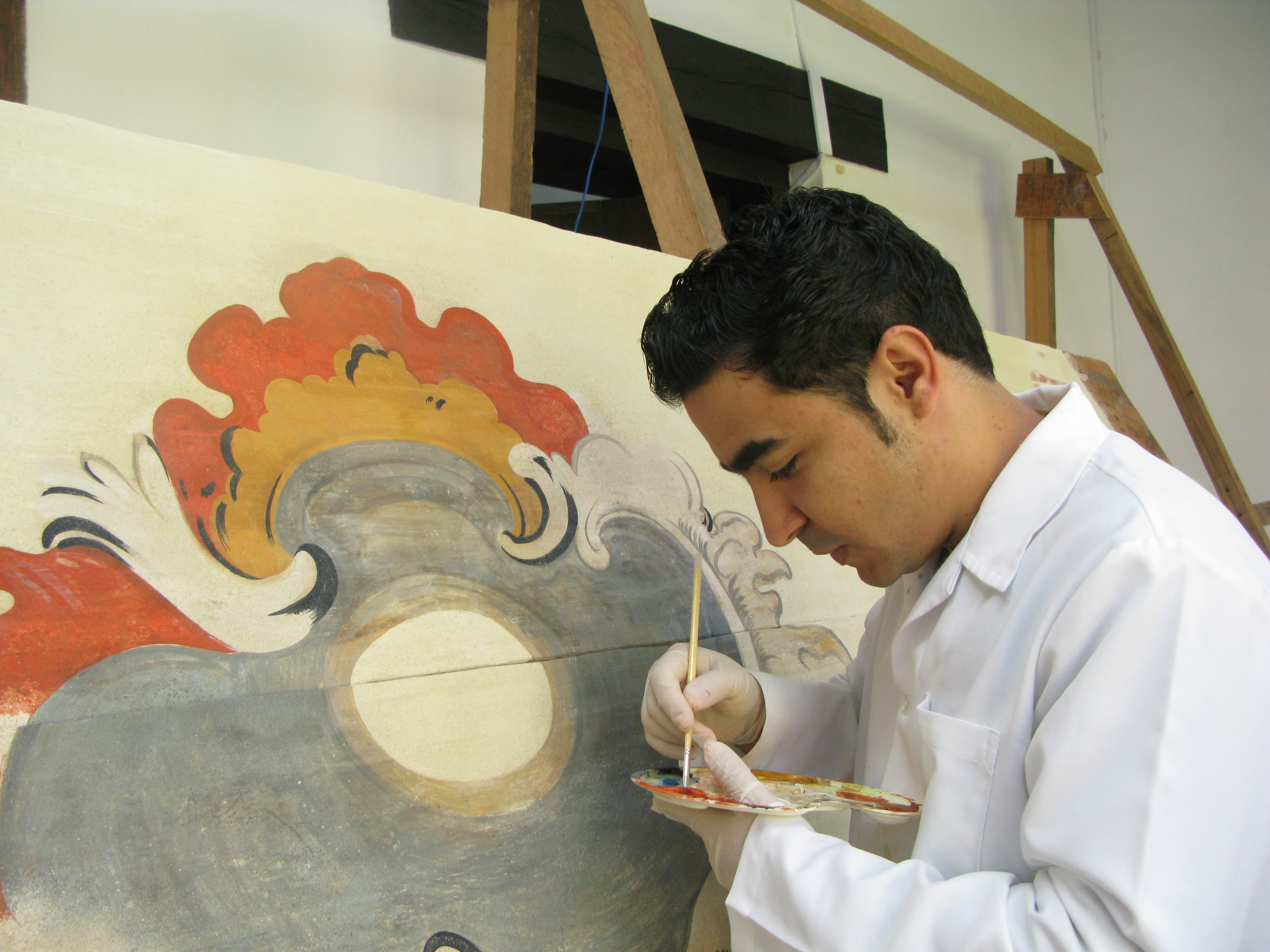 Restauração de arte